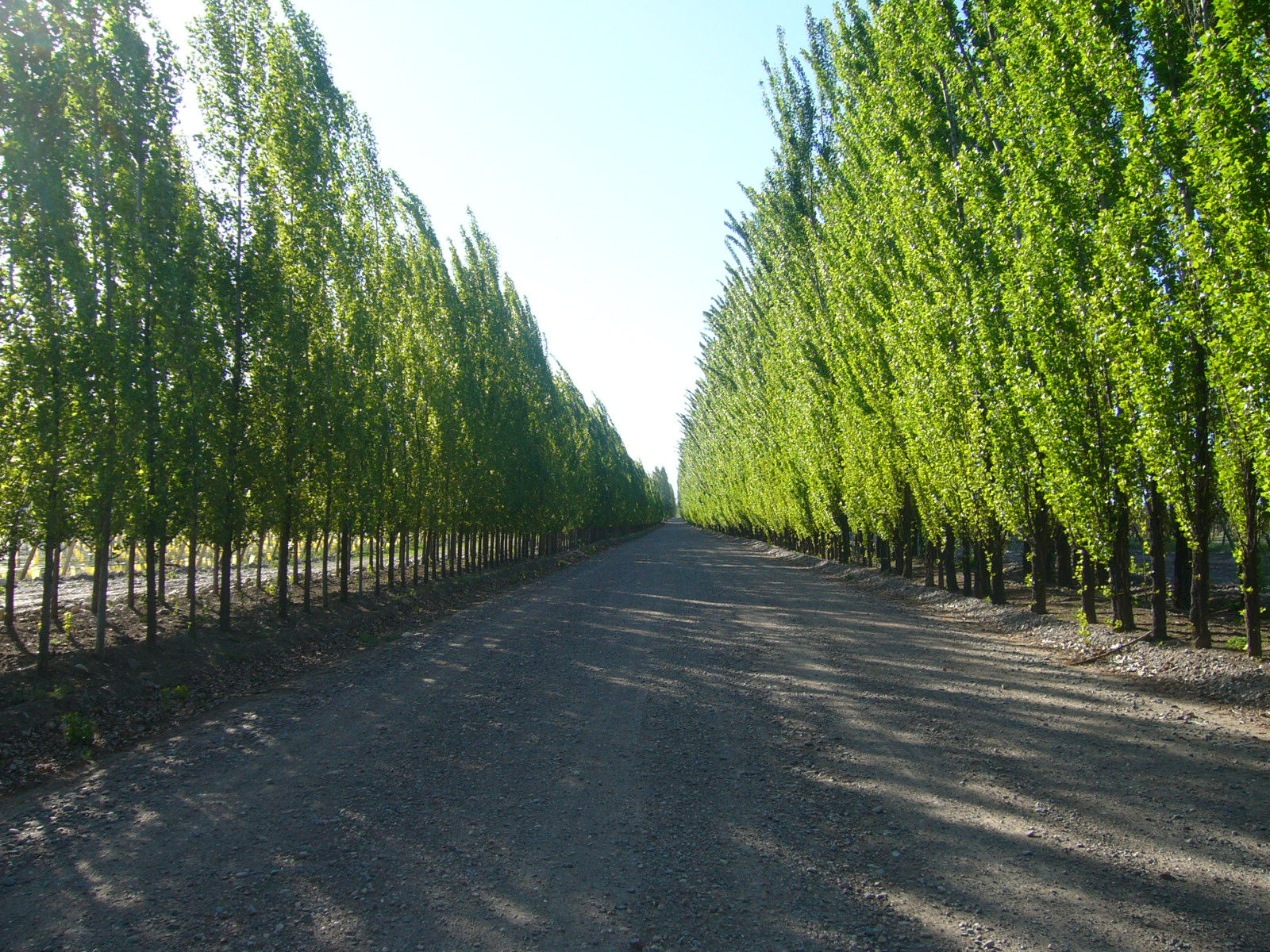 Hilera de alamos en Mendoza Autor: Roger Schultz